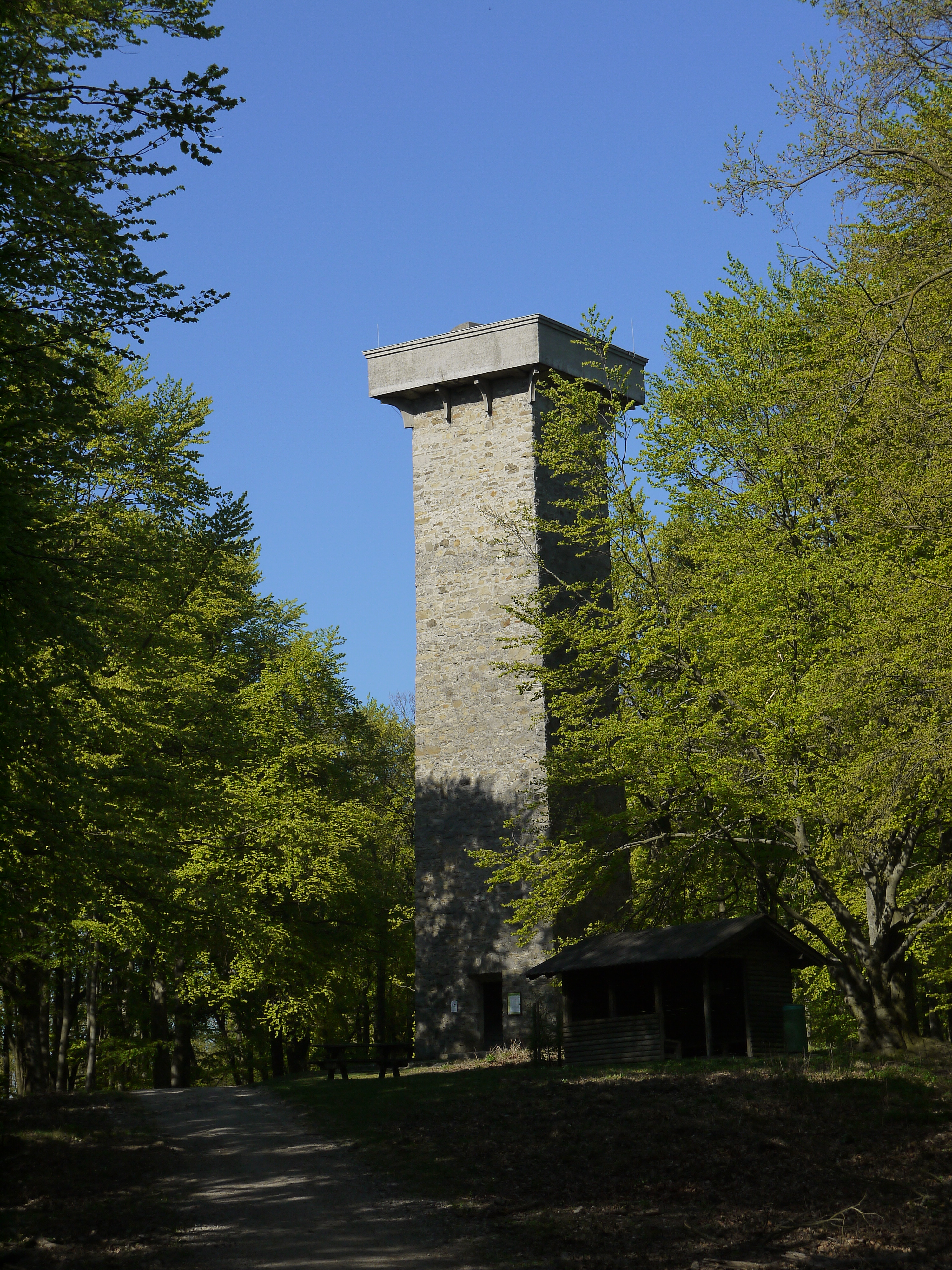 Lainzer Tiergarten This media shows the nature reserve in Vienna with the ID 1.